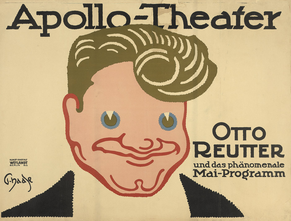 Apollo-Theater (Friedrichstraße 218, Kreuzberg). Otto Reutter und das phänomenale Mai-Programm. Plakat/Poster. Farblithographie. 71,5 x 94,5 cm. Berlin, Kunst-Anstalt Weylandt, um 1912.